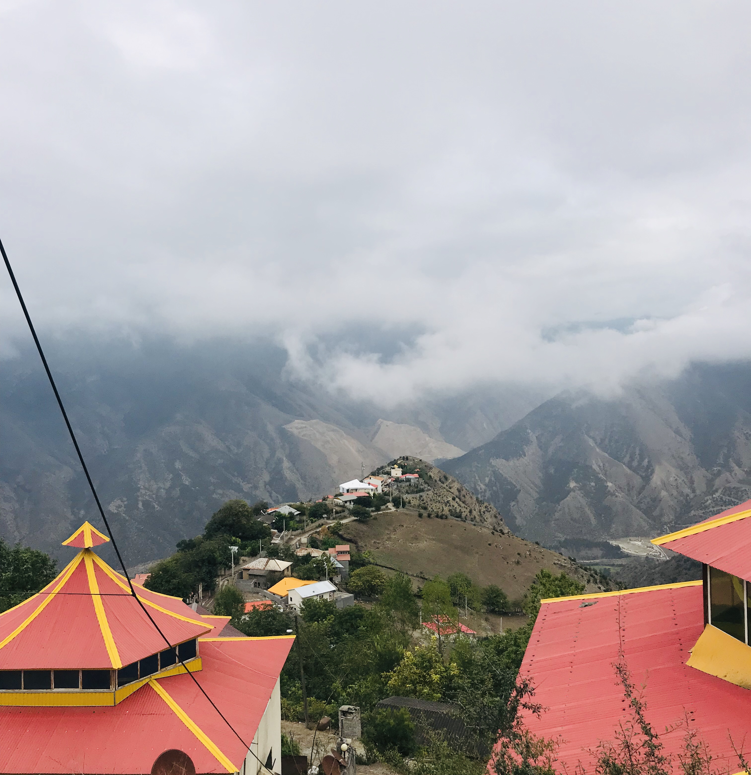 تصویری زیبا از پرن